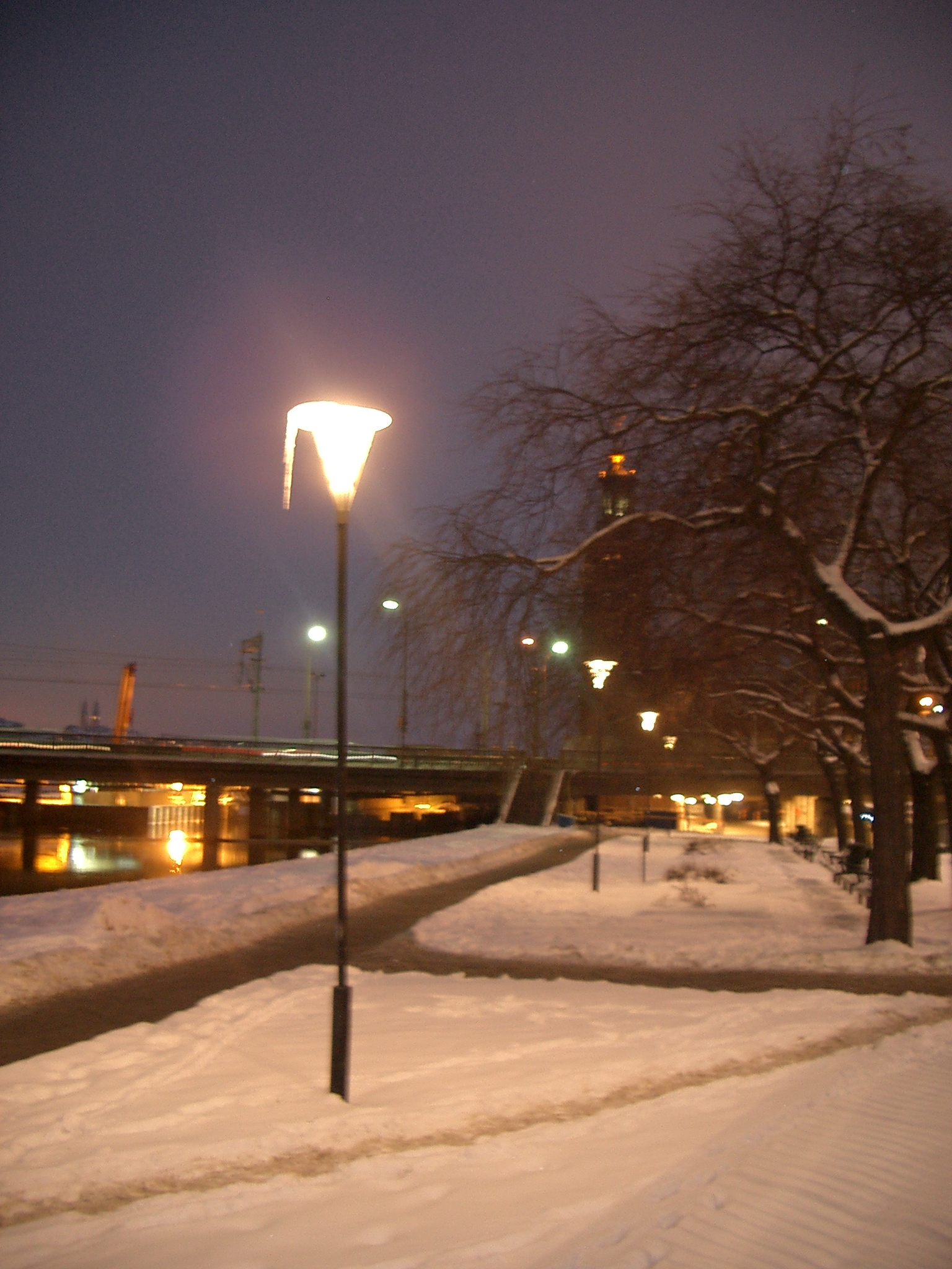 Stockholm City Hall